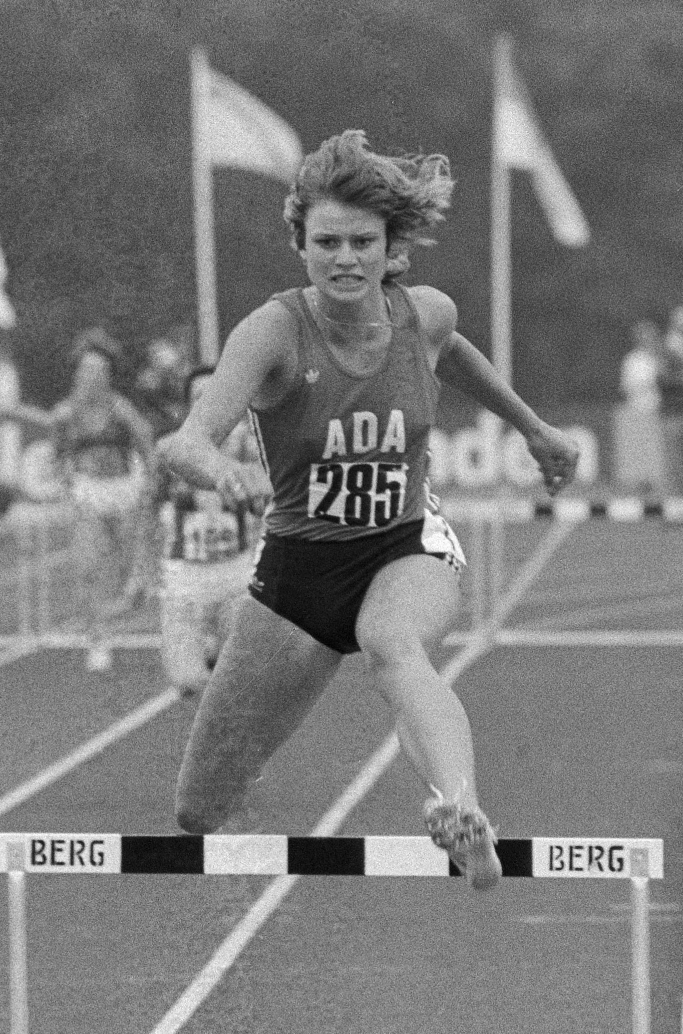 Nederlandse kampioenschappen atletiek te Utrecht. Winnares Olga Commandeur in aktie op 400m horden